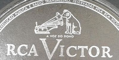 Logo da RCA Victor - Indústria Brasileira